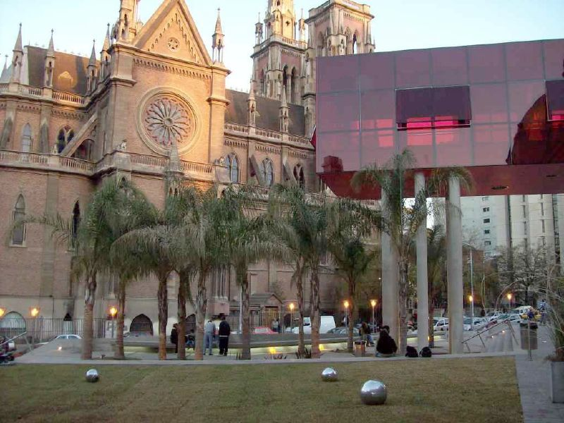 Capuchinos Church, Buen Pastor, Córdoba, Argentina